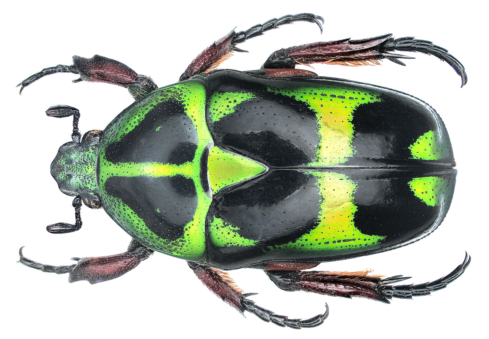 Familie: Scarabaeidae Groesse: 19 mm Fundort: Philippinen, Marinduque, 1983 det. U.Schmidt, 2006 Photo: U.Schmidt, 2006